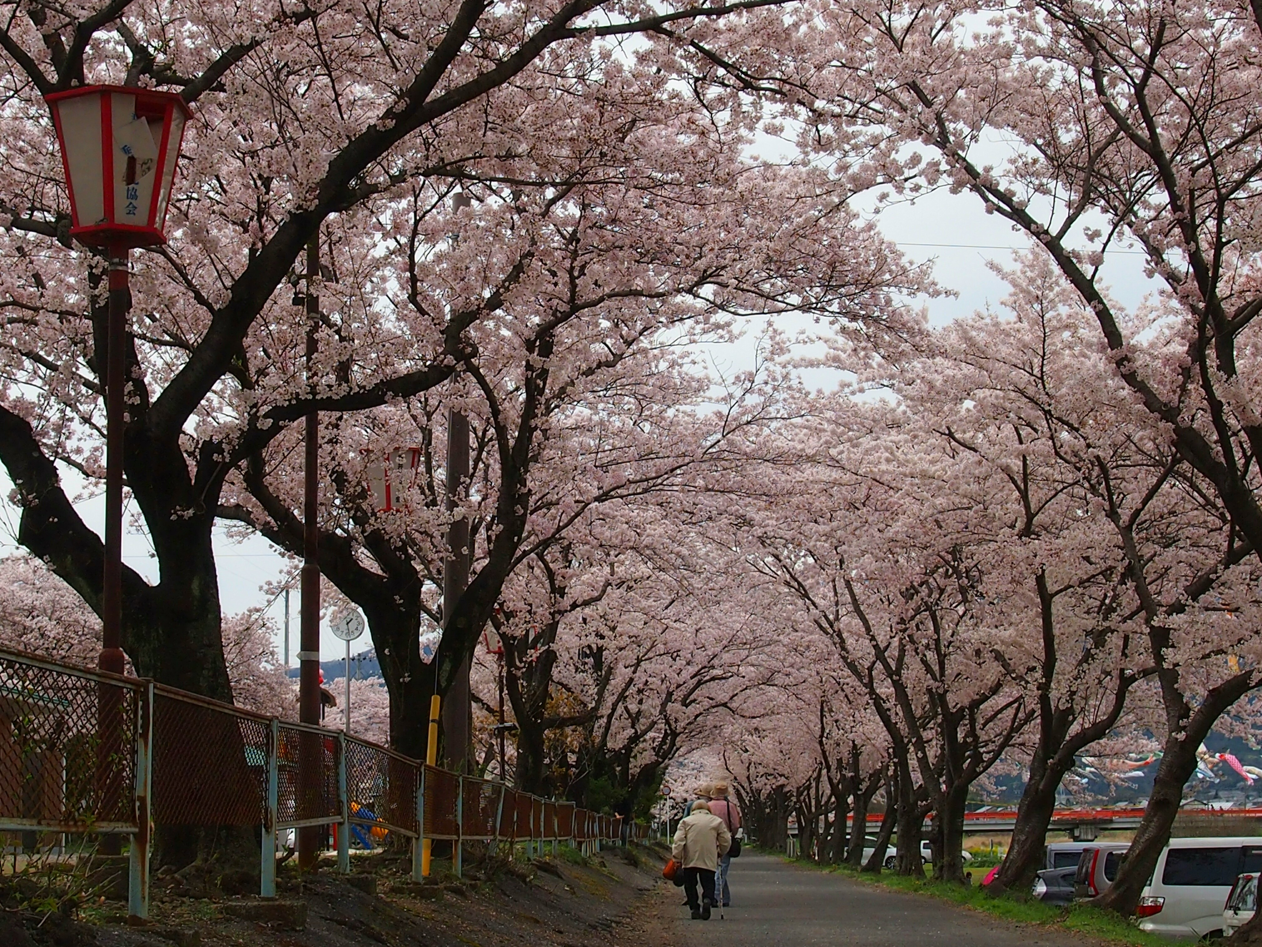 桜並木と鯉のぼり